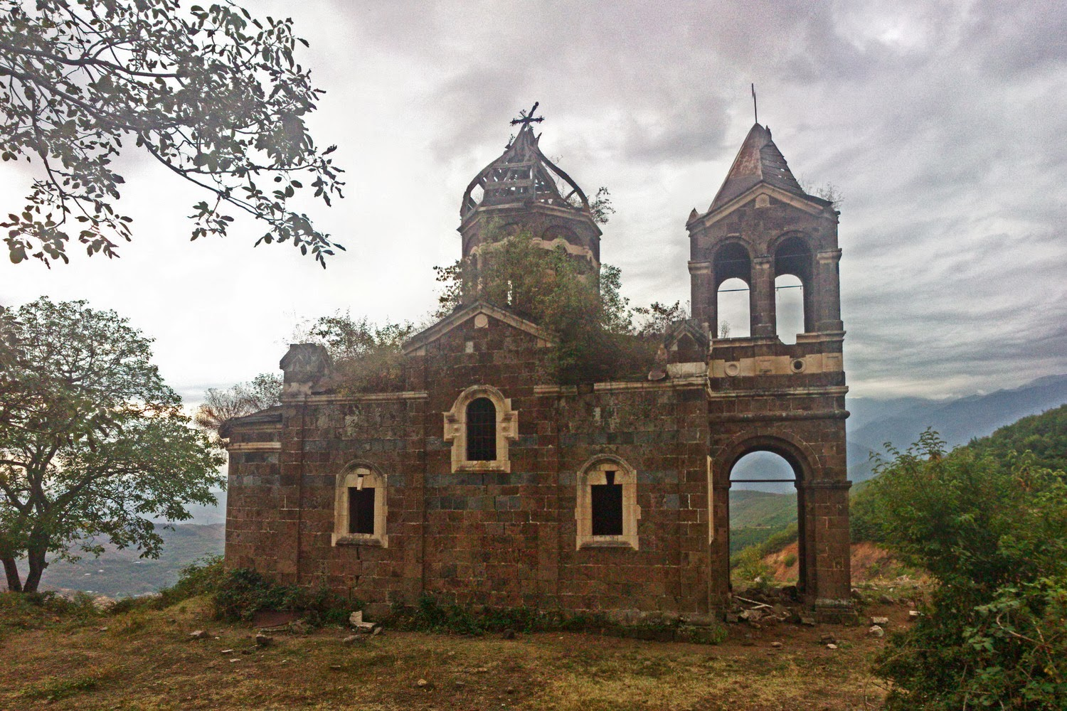 Kapan, Kavart, Greek church, 1865 Капан, Каварт, Храм во имя Св. священномученика Харалампия, 1865